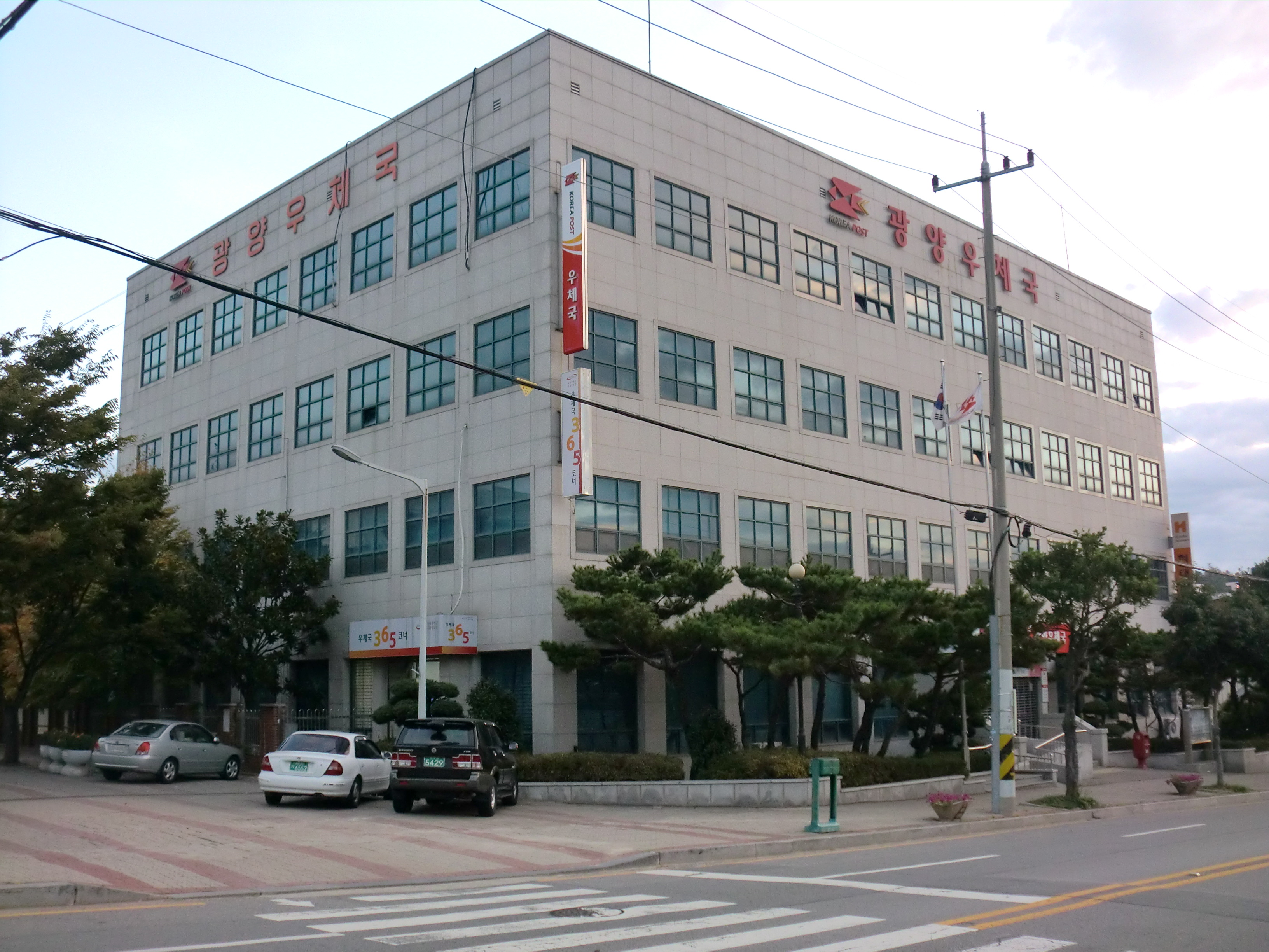 전라남도 광양시에 있는 광양우체국